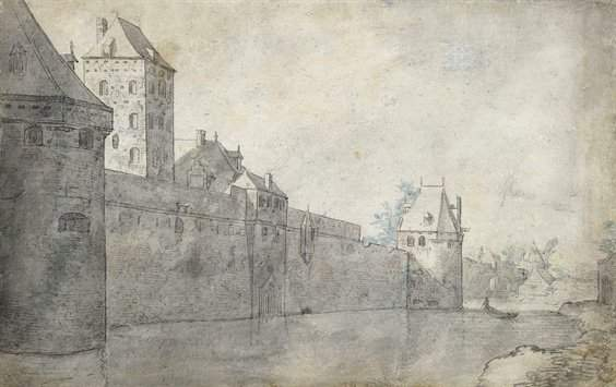 Tekening die een noordelijk deel van de Utrechtse stadsmuur toont. De hoge toren is de "Plompetoren" die nog niet verlaagd is. Links in de stadsmuur de waltoren de Vos, rechts de Beer. Een doorgang vanaf de verdedigingsgracht naar de Plompetorengracht bevindt zich tussen deze twee waltorens in de stadsmuur